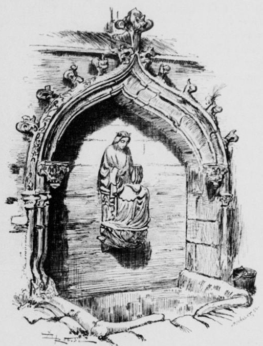 La fontaine du Folgoët vers 1900 (lithographie d'Albert Robida publiée danns "La vieille France, Bretagne" vers 1900)